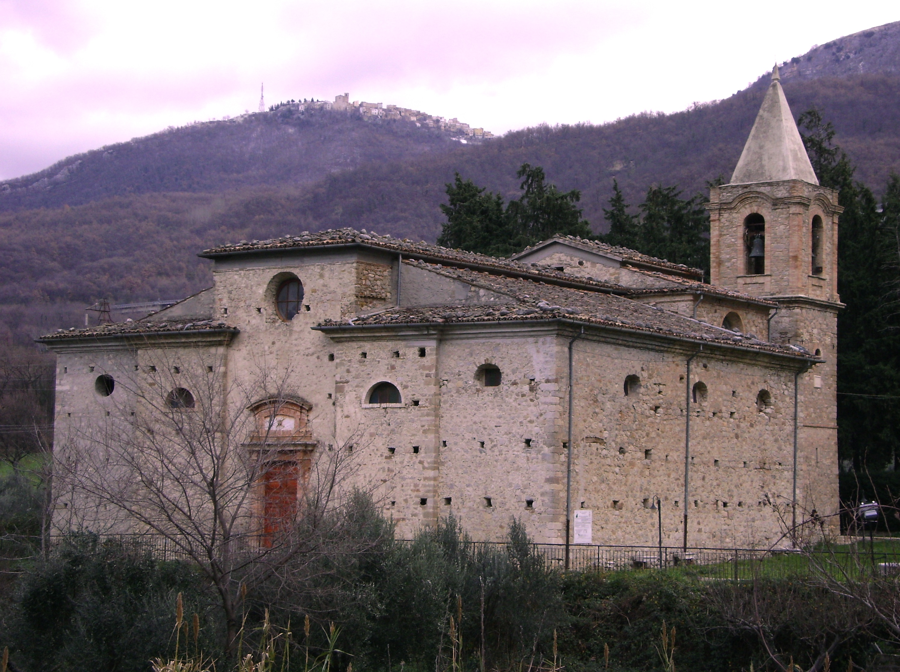 Chiesa della Madonna in Basilica. Villa Santa Maria, Chieti.